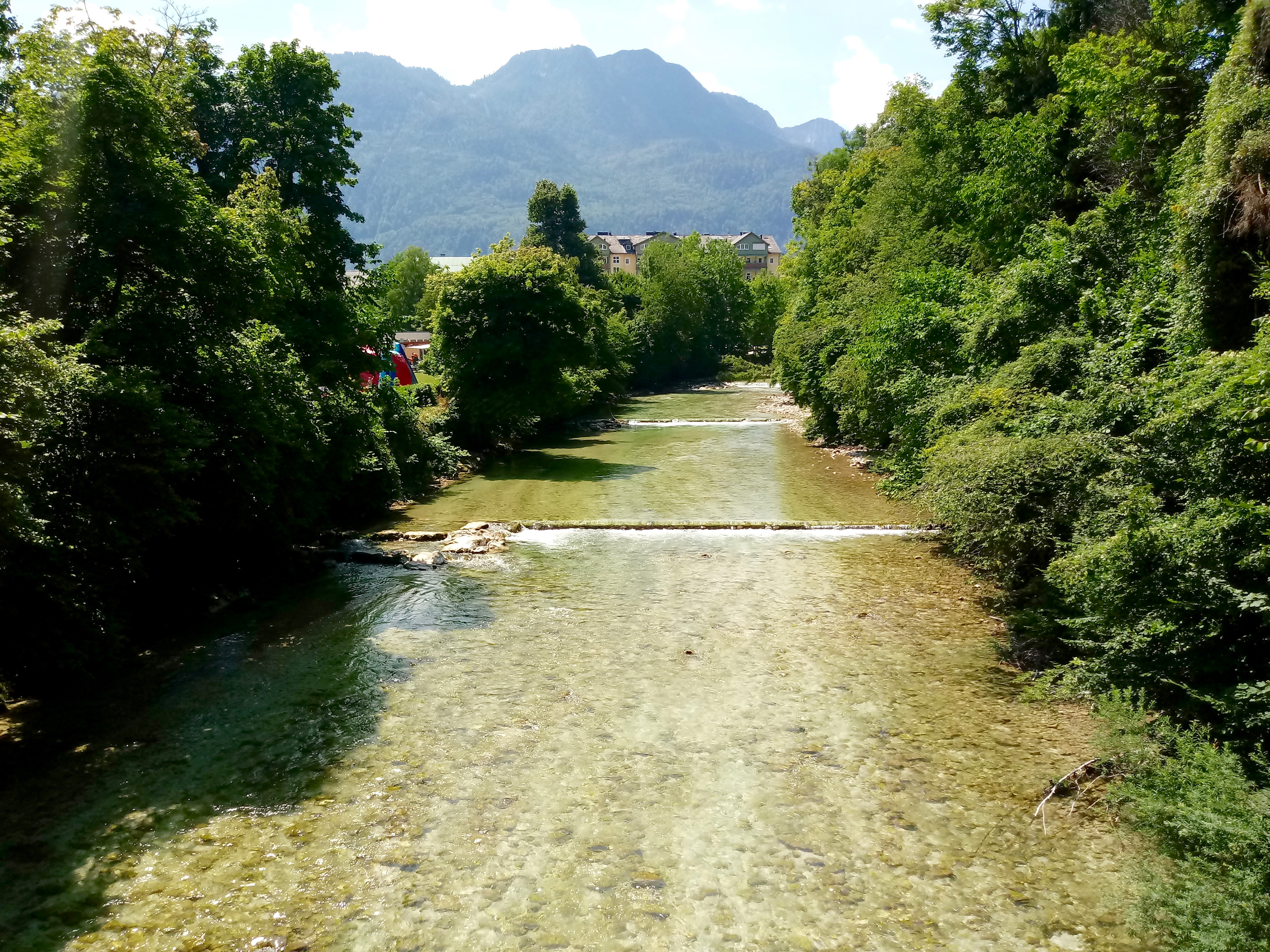 Fluss Ischl bei der Kaiservilla in Bad Ischl.